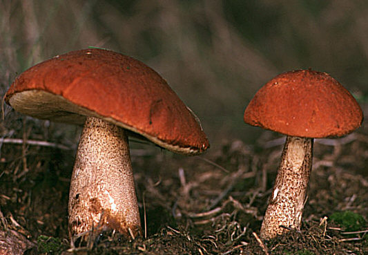 Espenrotkappe (Leccinum aurantiacum) Fotograf: Walter J. Pilsak, Waldsassen Copyright Status: GNU Freie Dokumentationslizenz